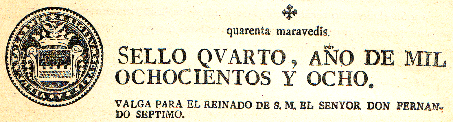 Paper segellat del 1808 imprès a Talarn (Pallars Jussà)